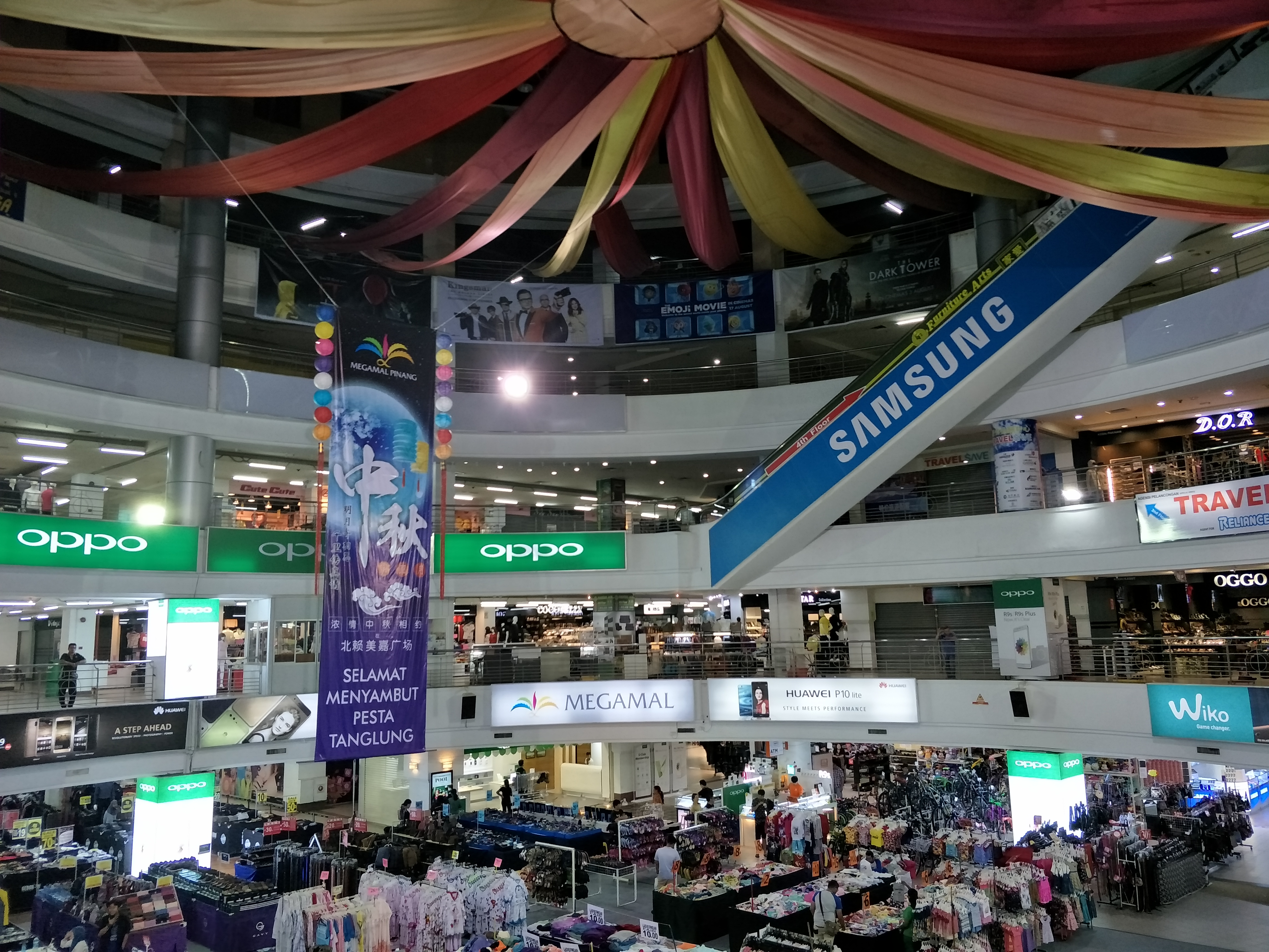 北赖美嘉广场的每个楼层。